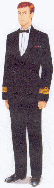 Rysunek ten pochodzi z załącznika do rozporządzenia ministra obrony narodowej z dnia 2 grudnia 2004 r. w sprawie wzorów oraz noszenia umundurowania i oznak wojskowych przez żołnierzy zawodowych i kandydatów na żołnierzy zawodowych.